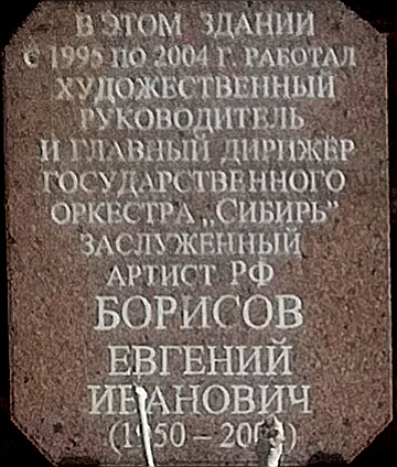 Барнаул. Красноармейский проспект, 28/118